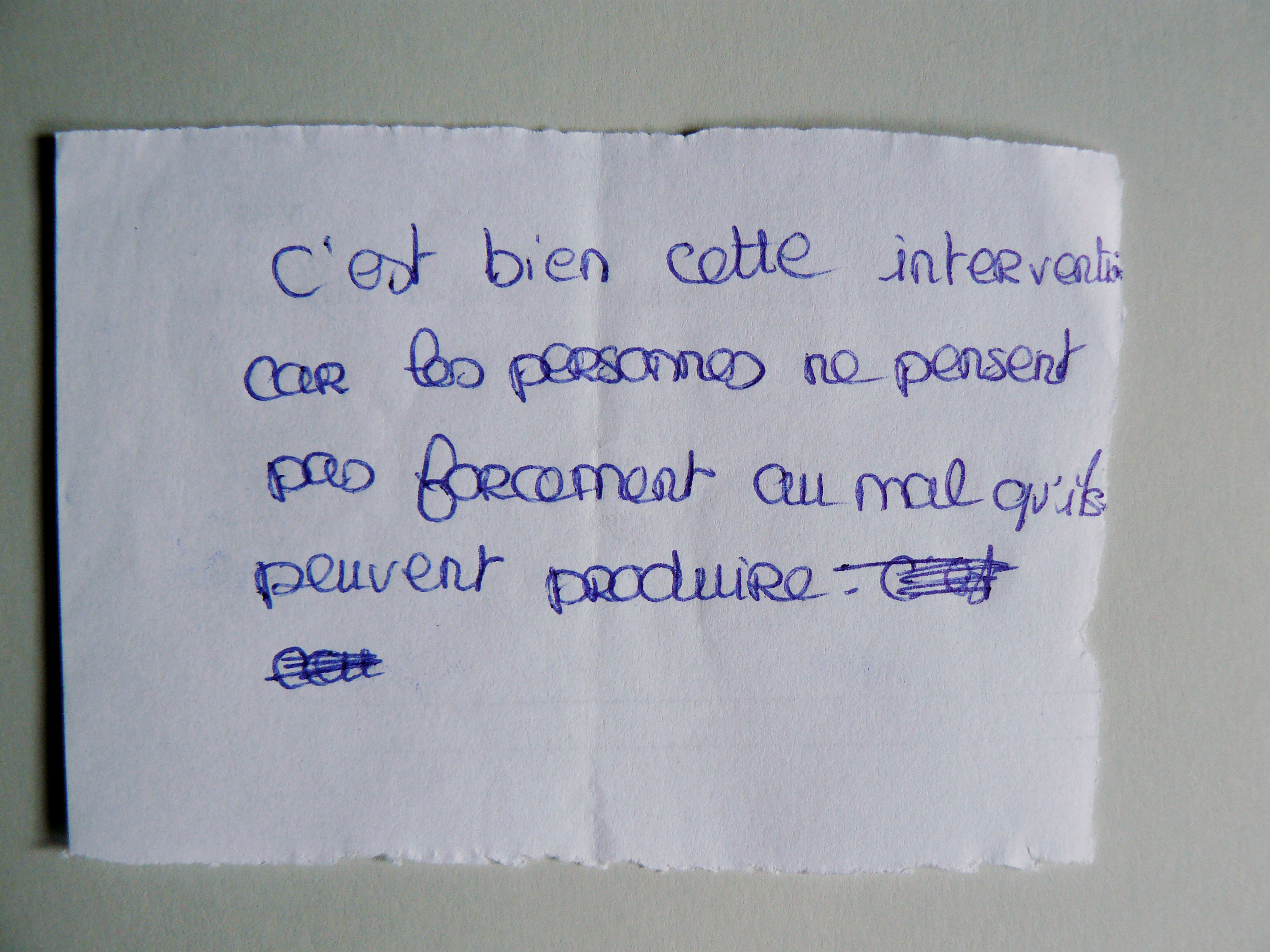 Message laissé anonymement par un élève lors d'une intervention de SOS homophobie dans une classe de collège